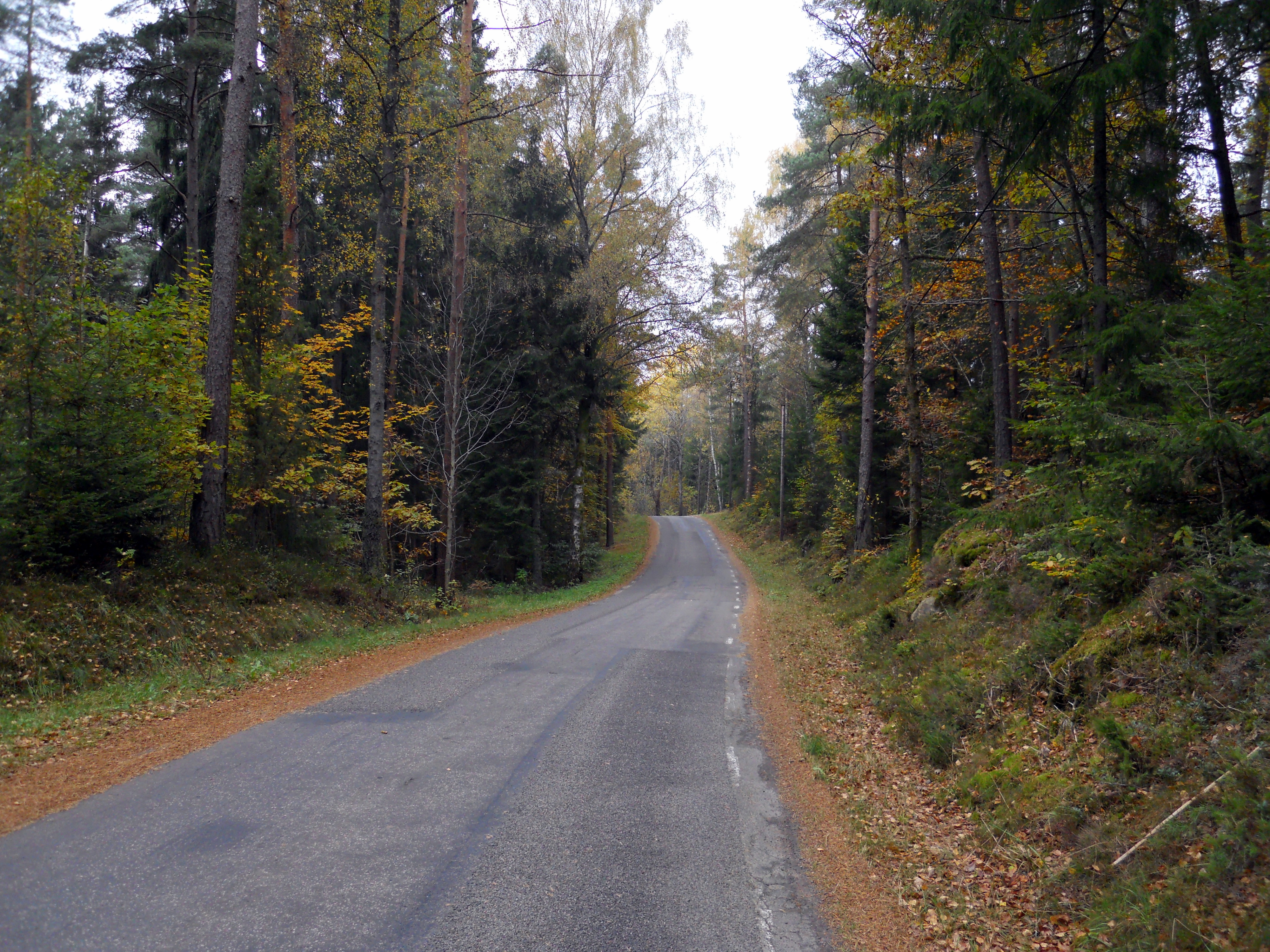 Nösslinge, Varbergs kommun, vägen mot Källsjö, Falkenbergs kommun.